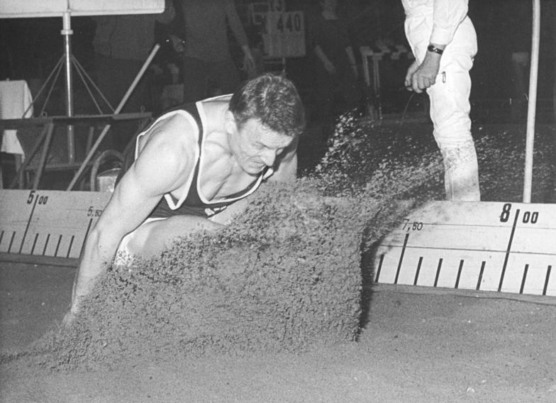 Klaus Beer Zentralbild Kutscher 8.2.70 Berlin: Hallenpremiere der Leichtathleten in der Berliner Dynamo-Sporthalle. Der Weitsprung-Silbermedaillengewinner von Mexiko Klaus Beer (SC Dynamo Berlin) verbesserte seine eigene deutsche Hallenbestleistung der DDR von 7,95 auf 7,96 m (Foto) .